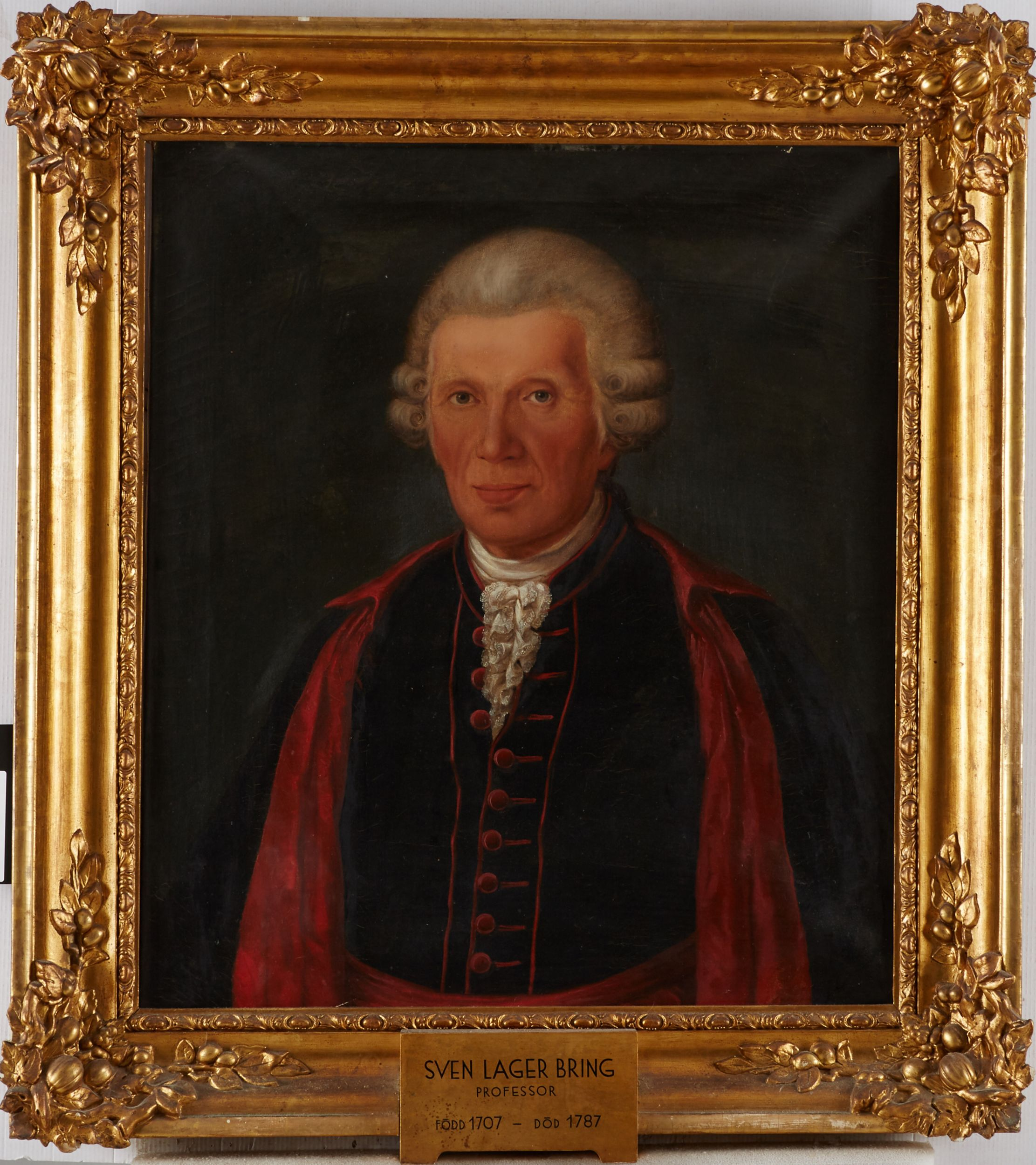 Porträtt av Sven Lagerbring (1707-1787) iklädd nationella dräkten. Kopia utförd 1862 av A. G. Hålström efter ett porträtt från 1780-talet.